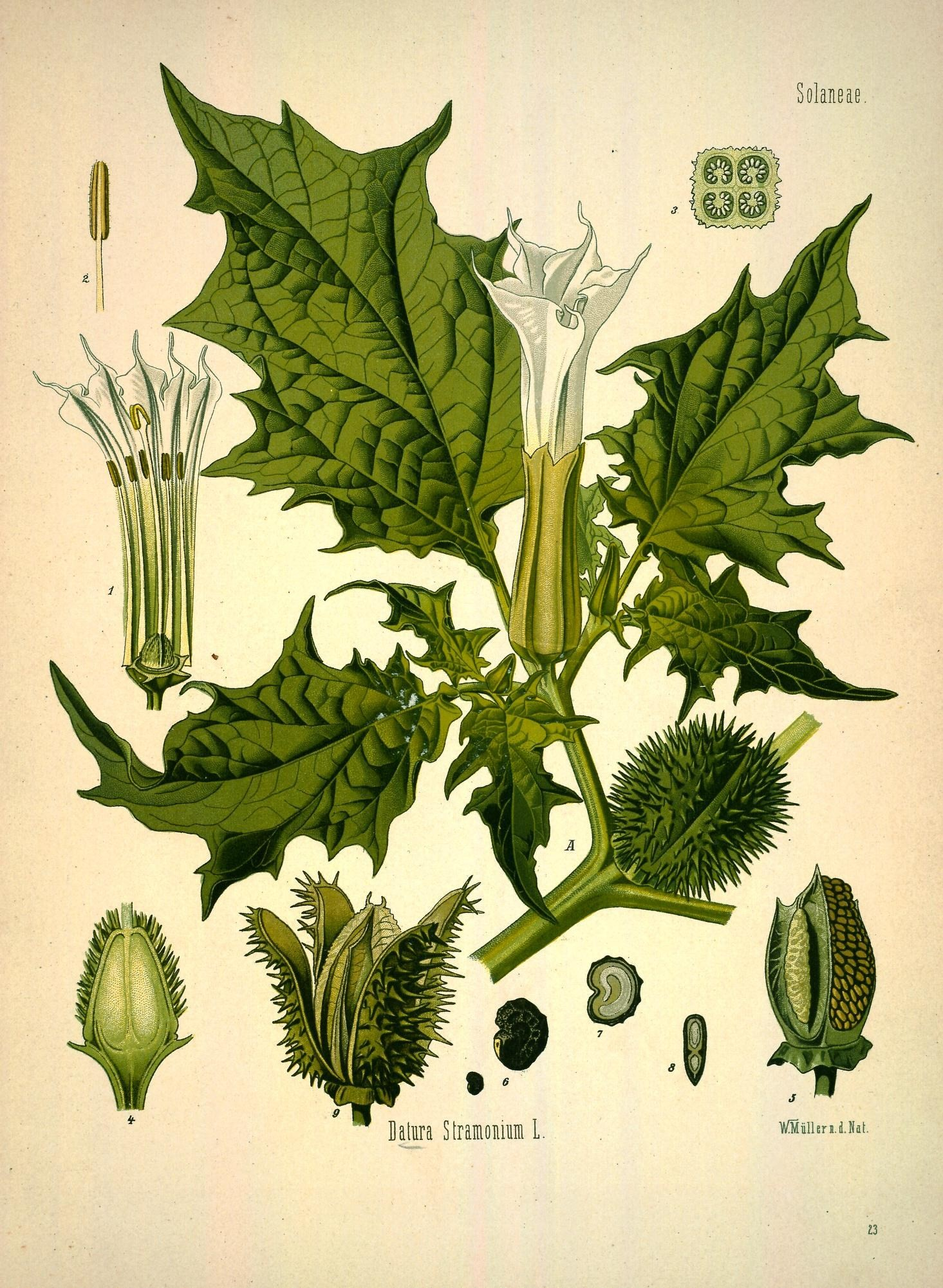 Stechapfel. A blühender und fruchtender Stengel in natürl. Grösse; 1 Blüthe von einem Theil der Krone befreit, desgl.; 2 Staubgefäss, vergrössert; 3 unterer Theil des Fruchtknotens im Querschnitt, desgl.; 4 derselbe im Längsschnitt, desgl.; 5 von der Kapsel befreite Frucht, natürl. Grösse; 6 Samen, natürl. Grösse und vergrössert; 7 derselbe in der Richtung der Breitseite, durchschnitten, desgl.; 8 derselbe in der Richtung der schmalen Seite, durchschnitten desgl.; 9 reife geöffnete Frucht, natürl. Grösse.